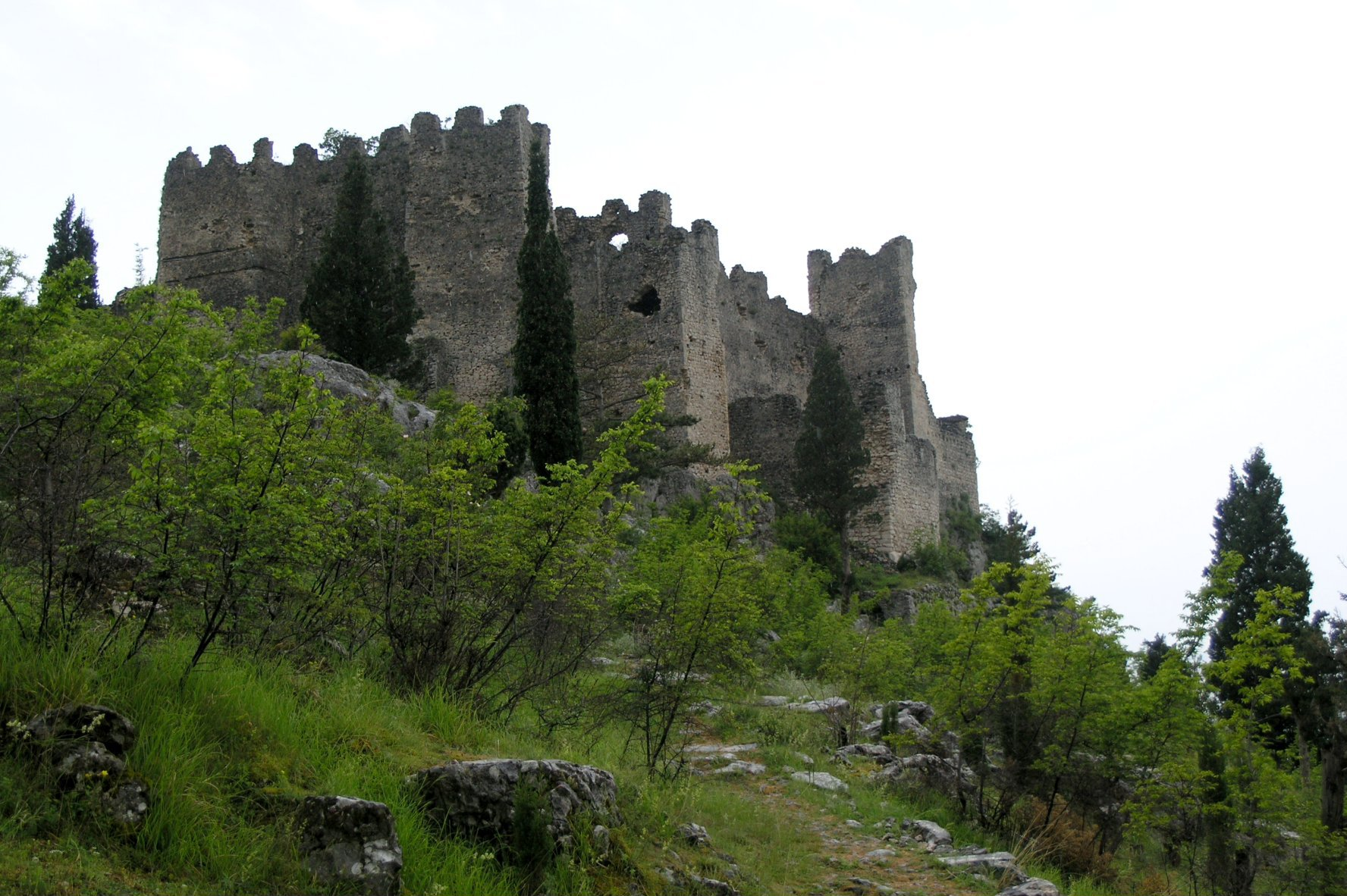 Blagaj